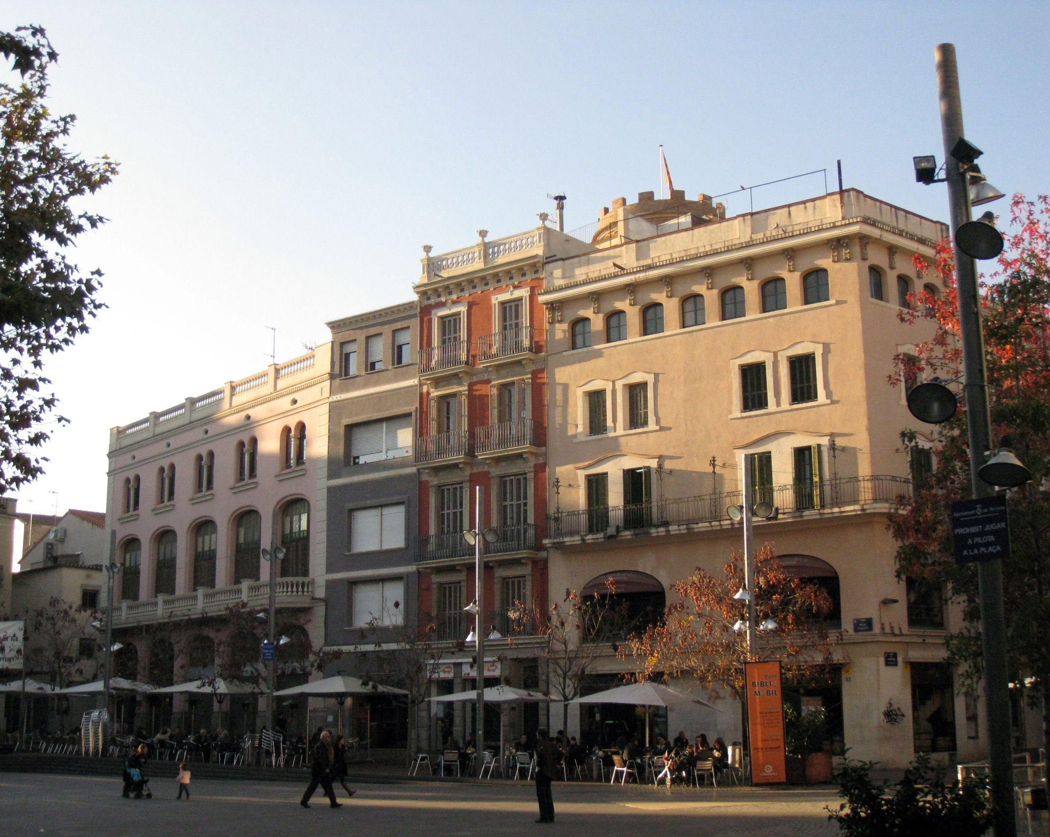 Part nord de la plaça Vella de Terrassa. Darrere les cases treu el cap la torre del Palau. A l'esquerra, l'antic Cafè Colon, de Lluís Muncunill. De color vermell, la casa Badia, i a la dreta, la casa Francisca Sendra, totes dues de Melcior Viñals.